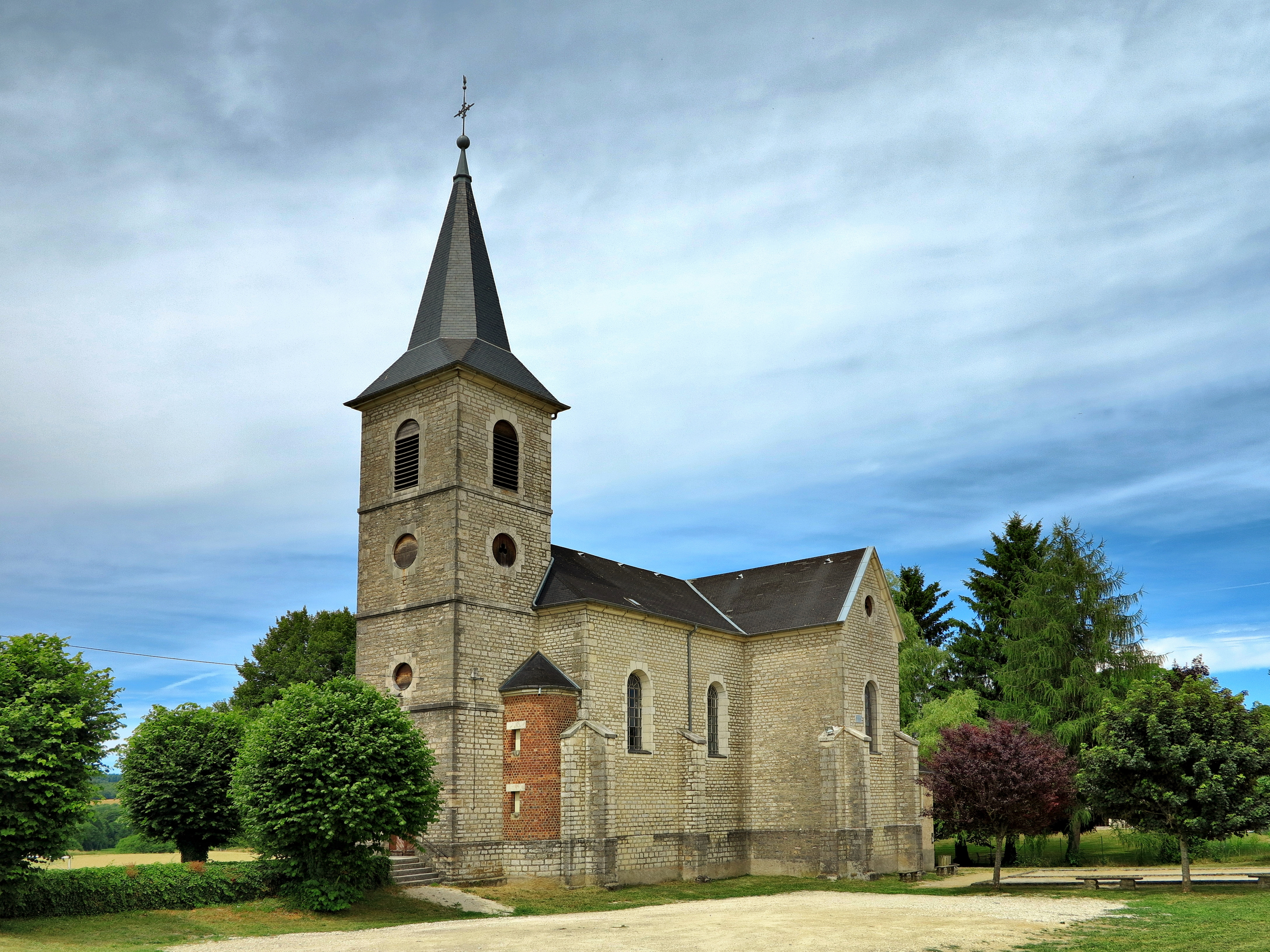 L'église de Trésilley